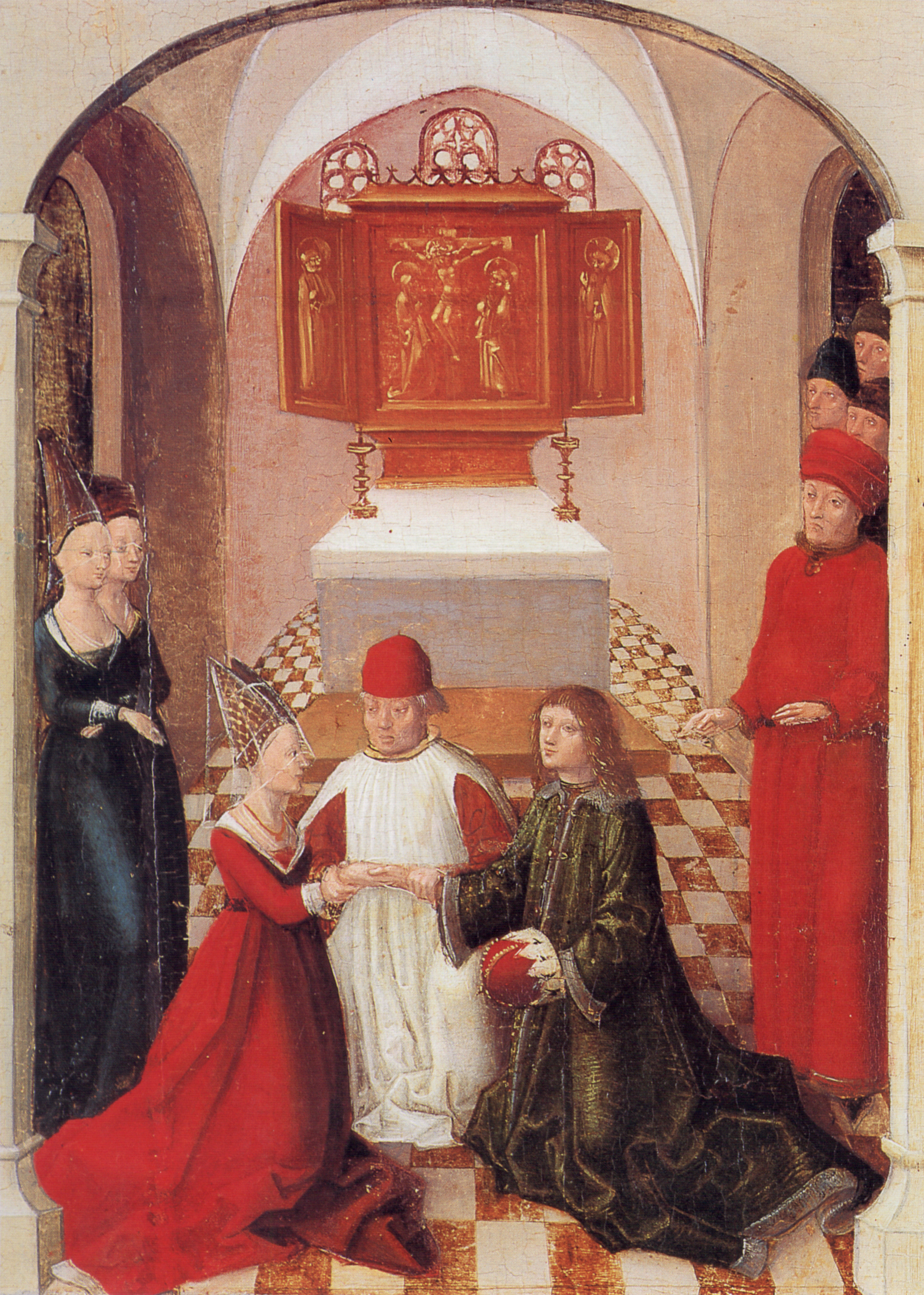 Weingartener Heilig-Blut-Tafel von 1489. Landesmuseum Württemberg, Stuttgart. Tafel 21: Judith von Flandern heiratete Welf IV. von Altdorf